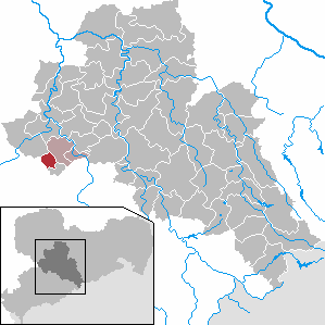 Mühlau in Saxony - district Mittelsachsen